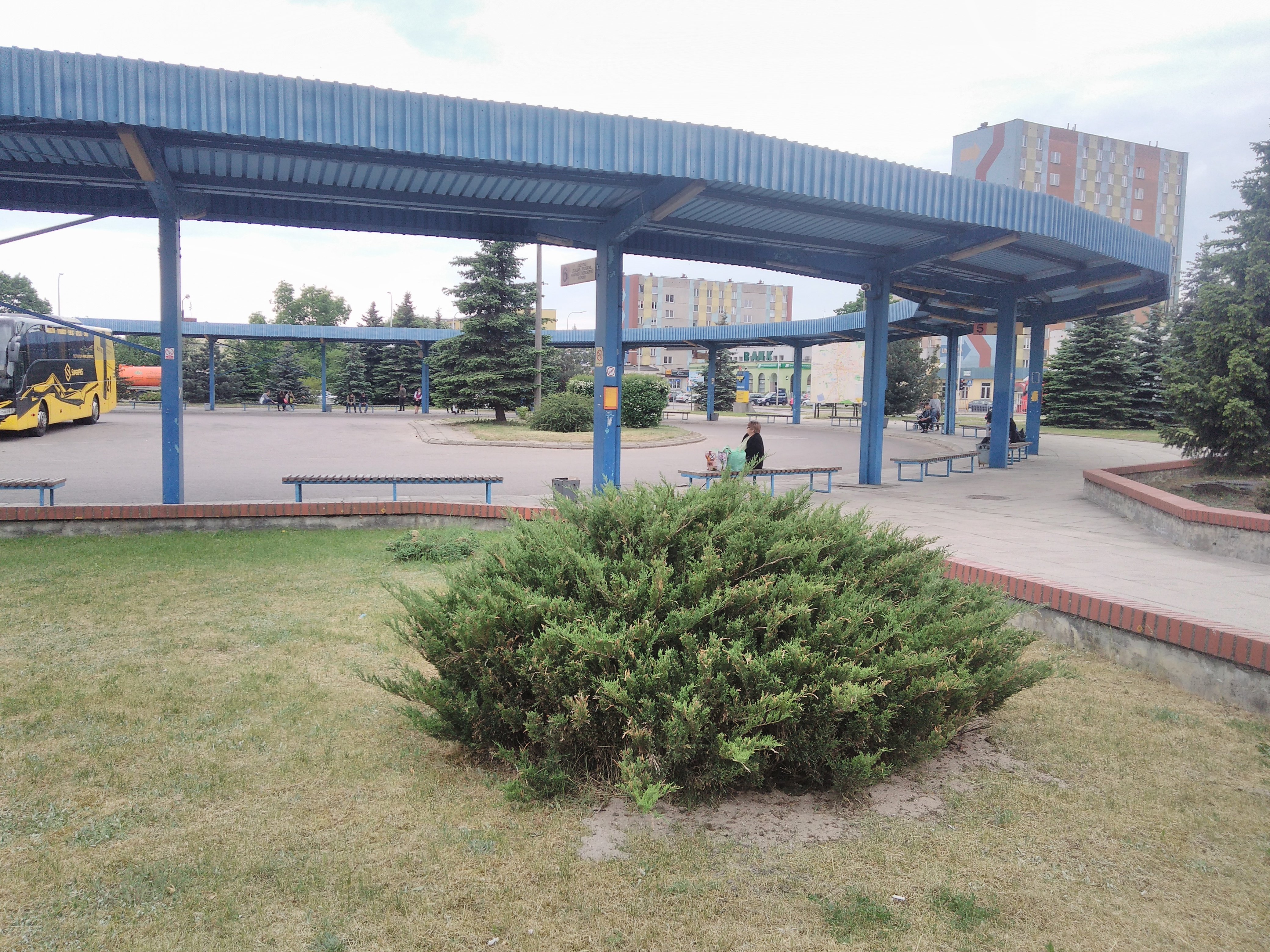 Dworzec PKS Nova Suwałki